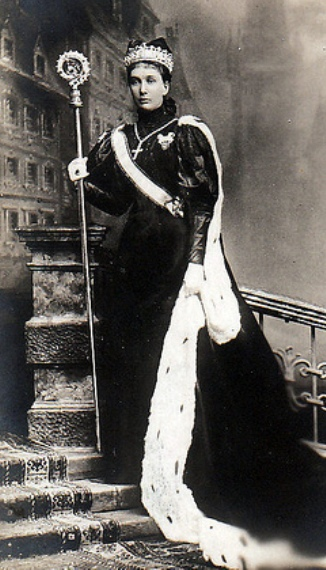 Maria Annunziata, Erzherzogin von Österreich (1876-1961), Äbtissin des Prager Damenstifts 1894–1918.